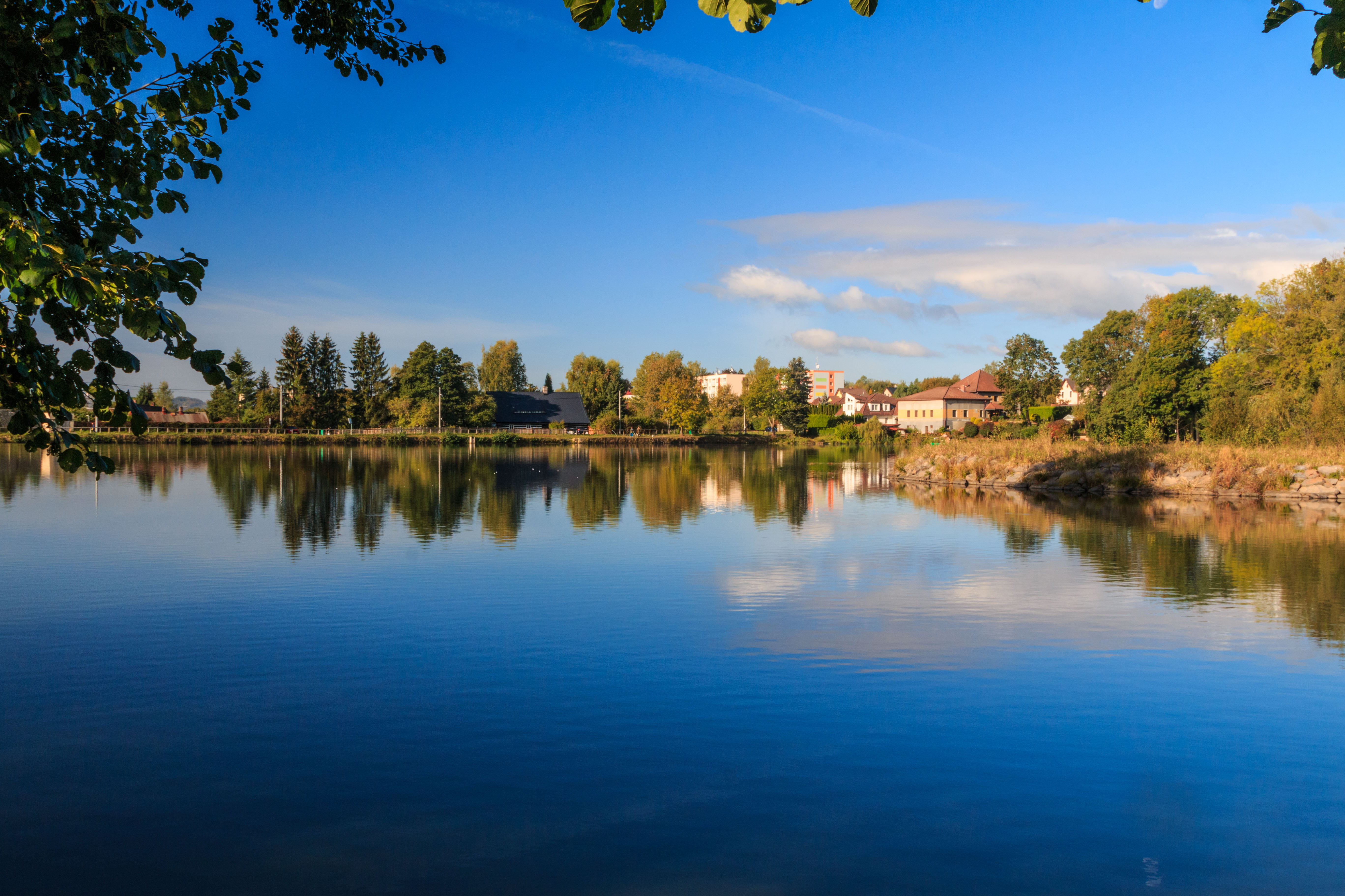 Markvartický rybník Project: Vodstvo.